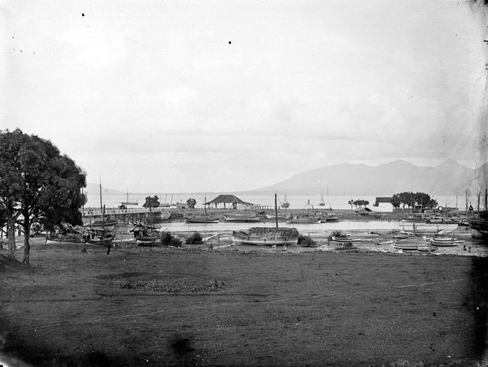 Negatief. Reede en Straat Bali, Banjuwangi, Oost-Java